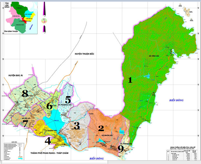 G